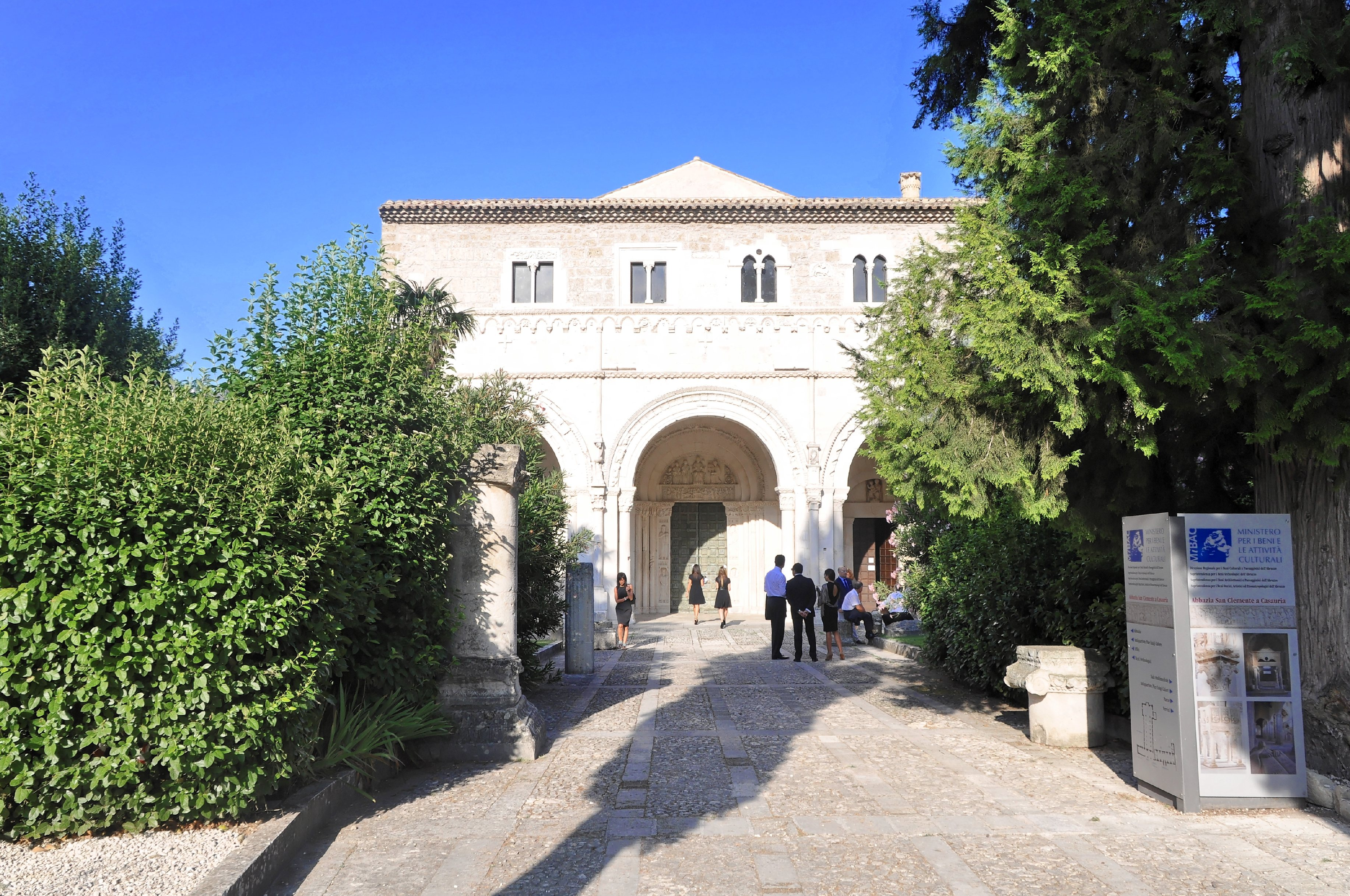 Abbazia di San Clemente a Casauria 2013